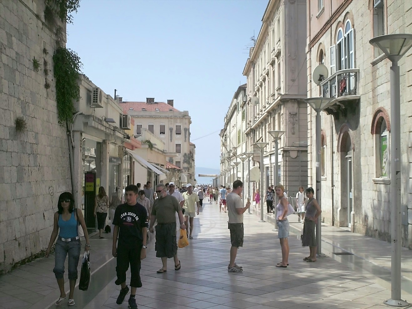 19.07.2007. _ Split